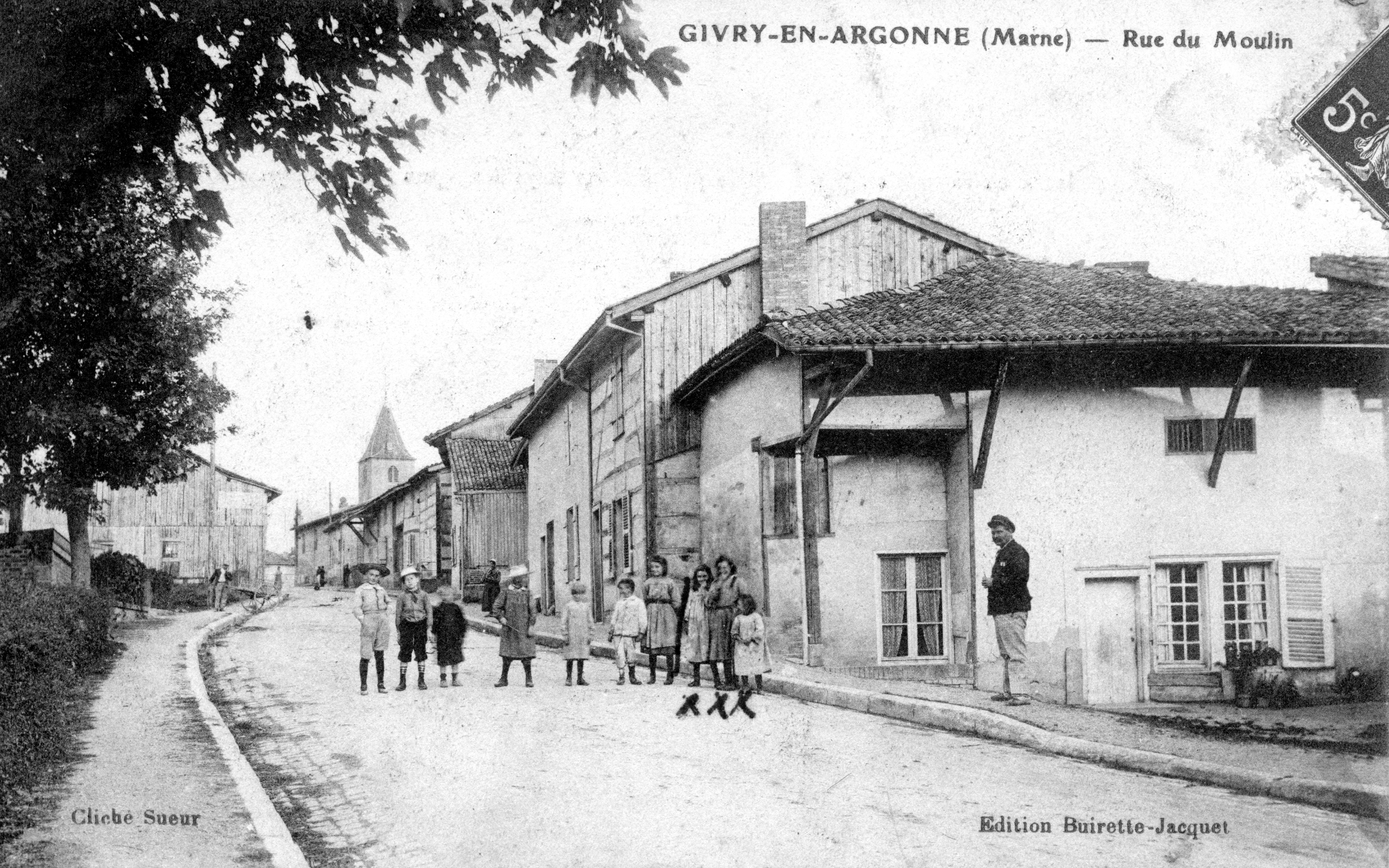 1910-carte postale de Givry en Argonne (Marne) Rue du Moulin, carte adressée à mademoiselle Camille Royer de Charmontois (Marne).Sur la photo, les 3 sœurs Royer (Yvonne, Gabrielle, Jeanne)